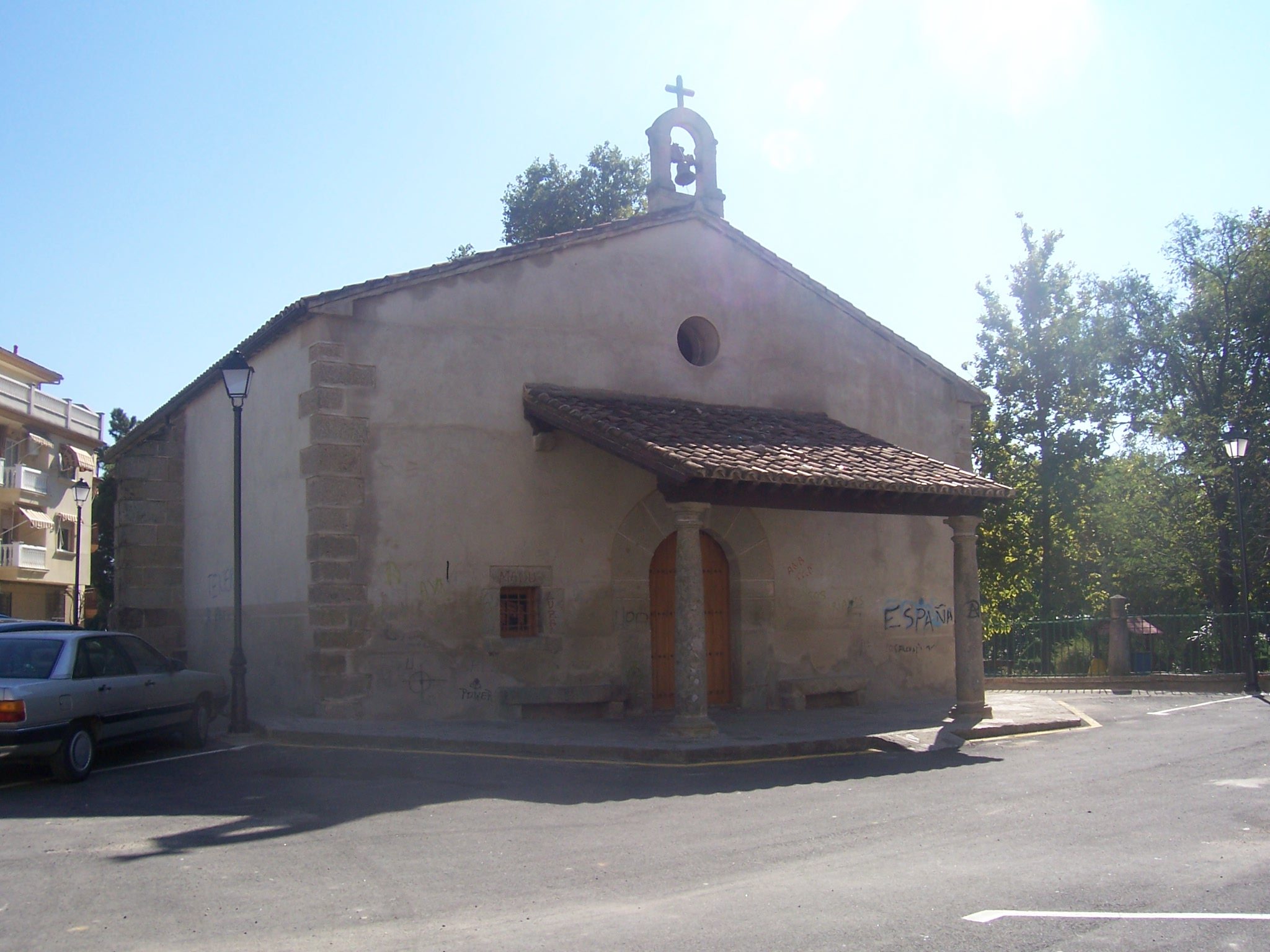 Ermita de San Sebastián en Montehermoso, Cáceres, España (octubre de 2007)